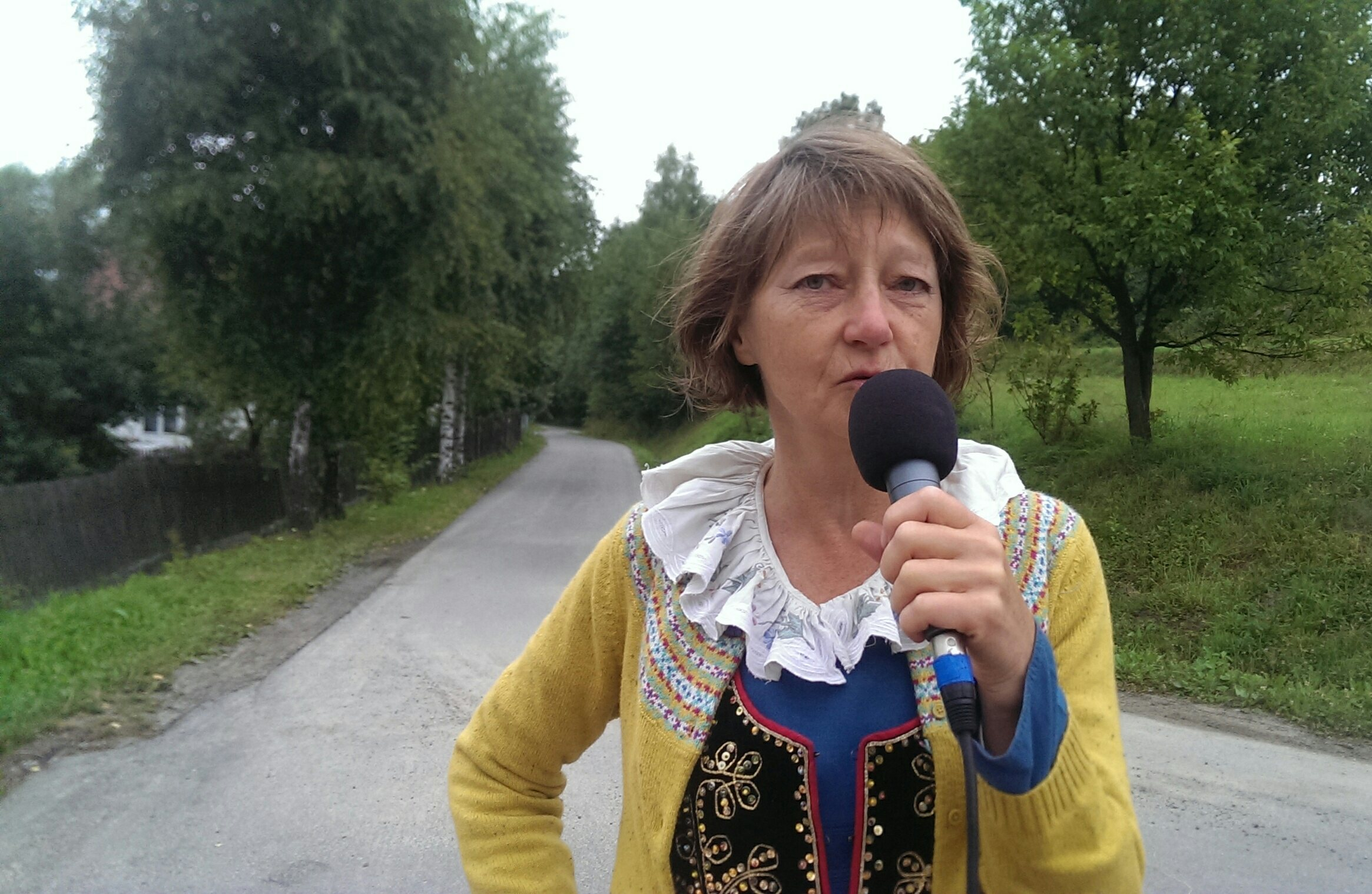 Jadwiga Łopata, działaczka na rzecz środowiska.